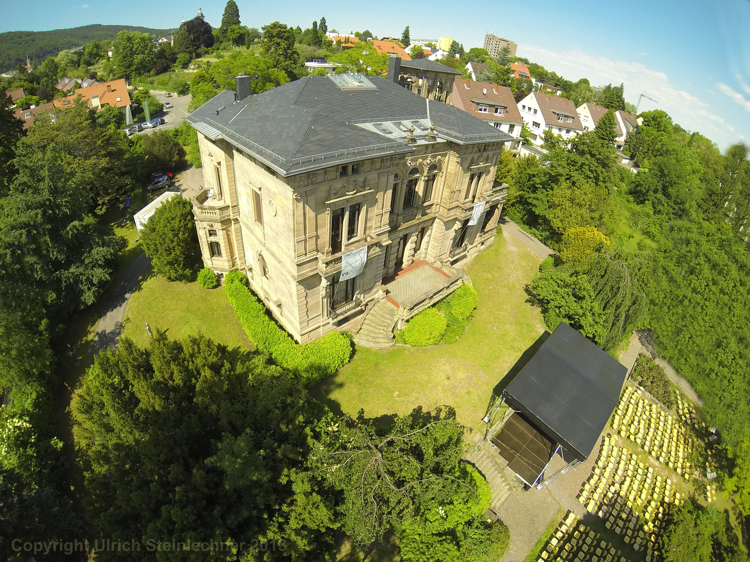 Luftbild der Villa Böhm mit Bühne und Bestuhlung für Zuschauer